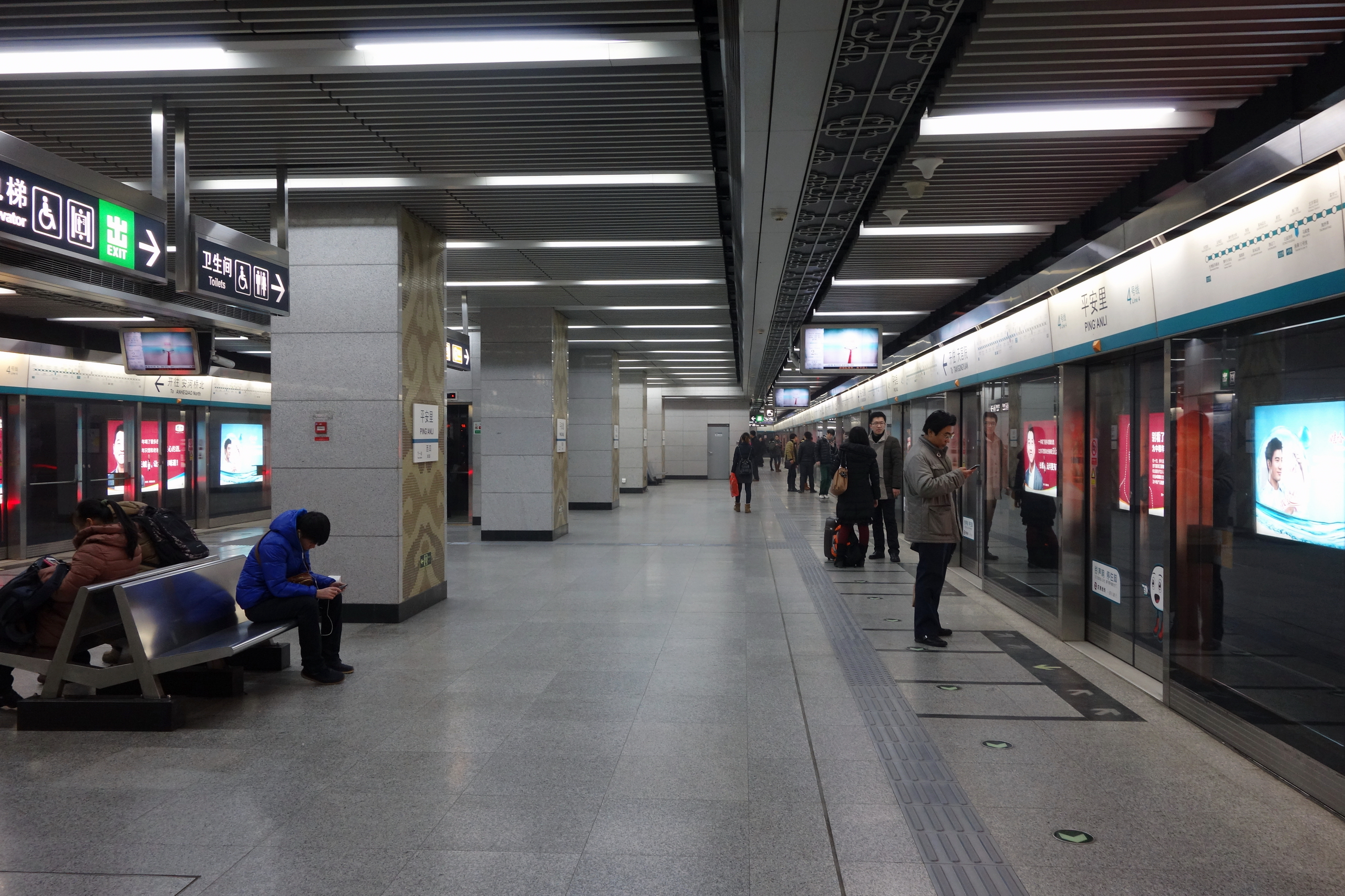 北京地铁4号线平安里站岛式站台